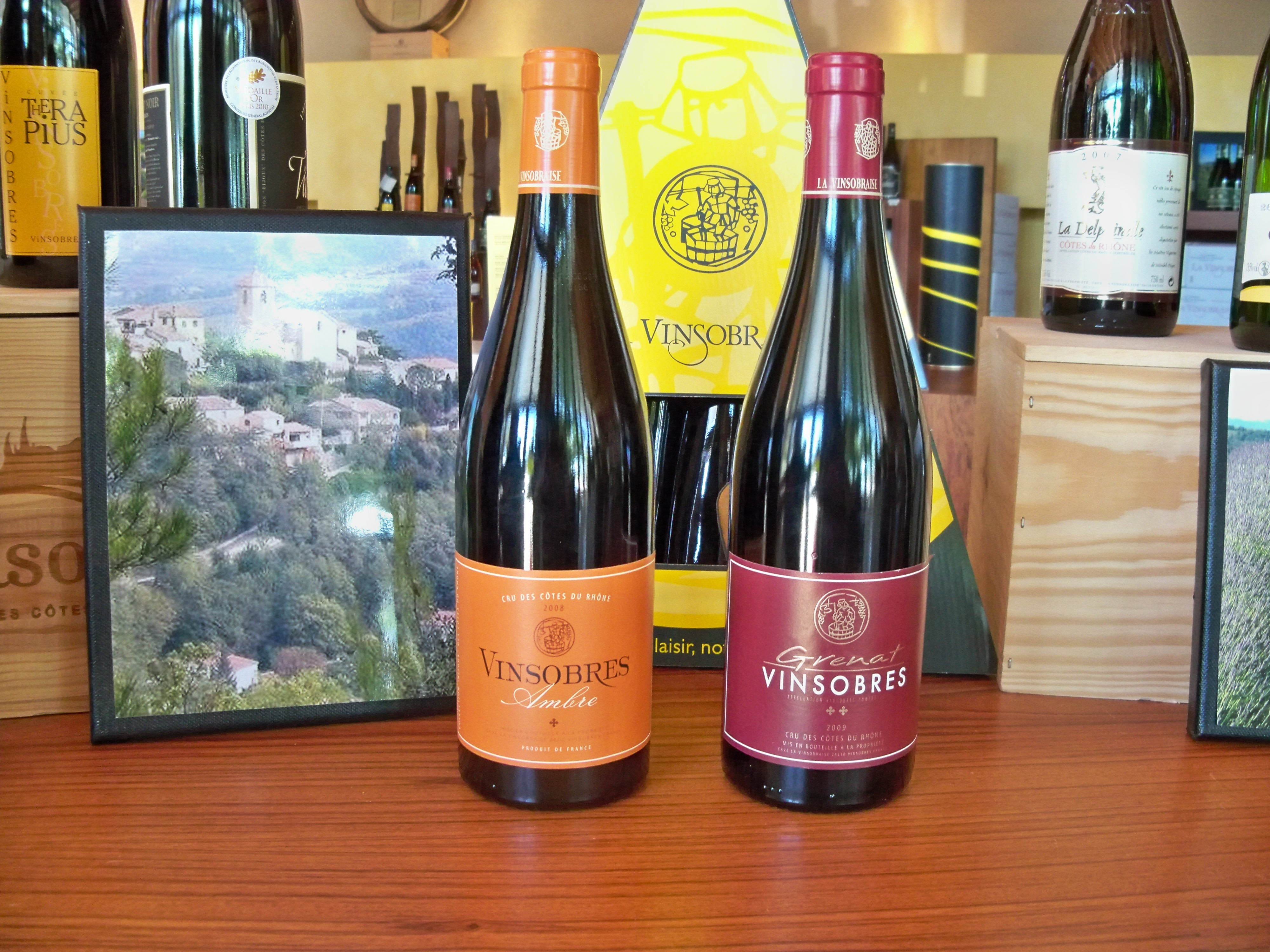 Bouteilles de Côtes du Rhône Rouge, Drôme, France